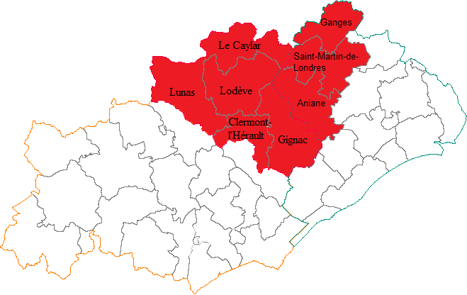 Carte des cantons composant l'arrondissement de Lodève (Hérault), (avant la réforme administrative de 2009)